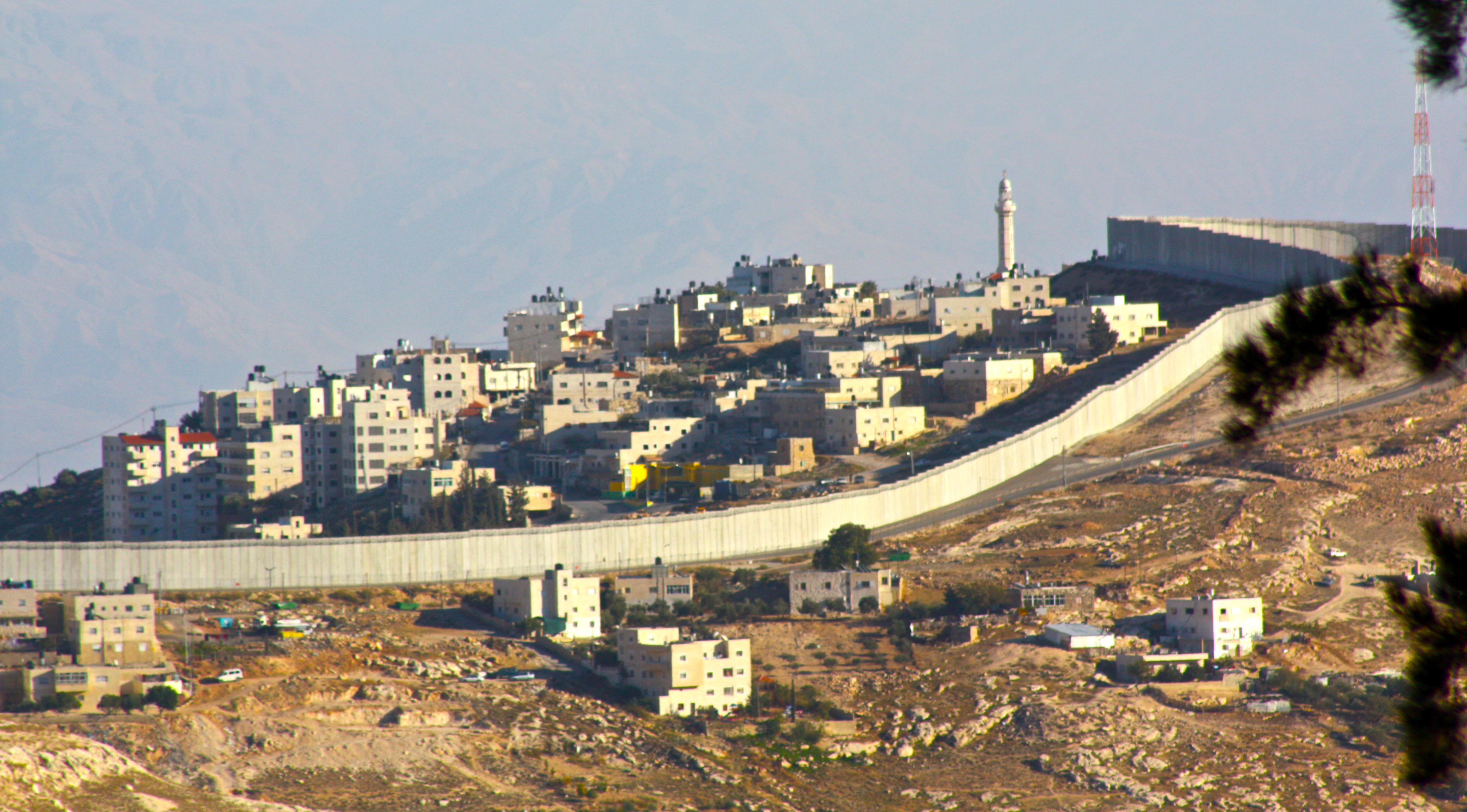 Israel - Jerusalem - Mount Zion - 03 Israel